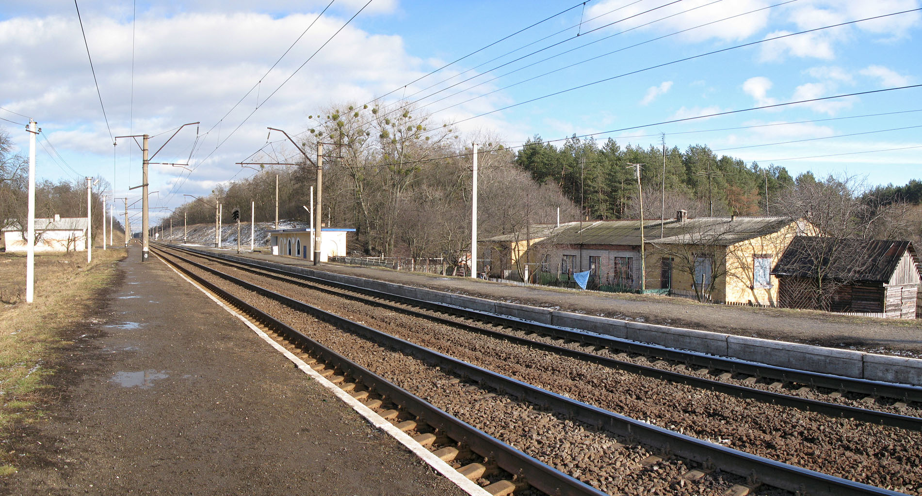 Платформа Снітинка